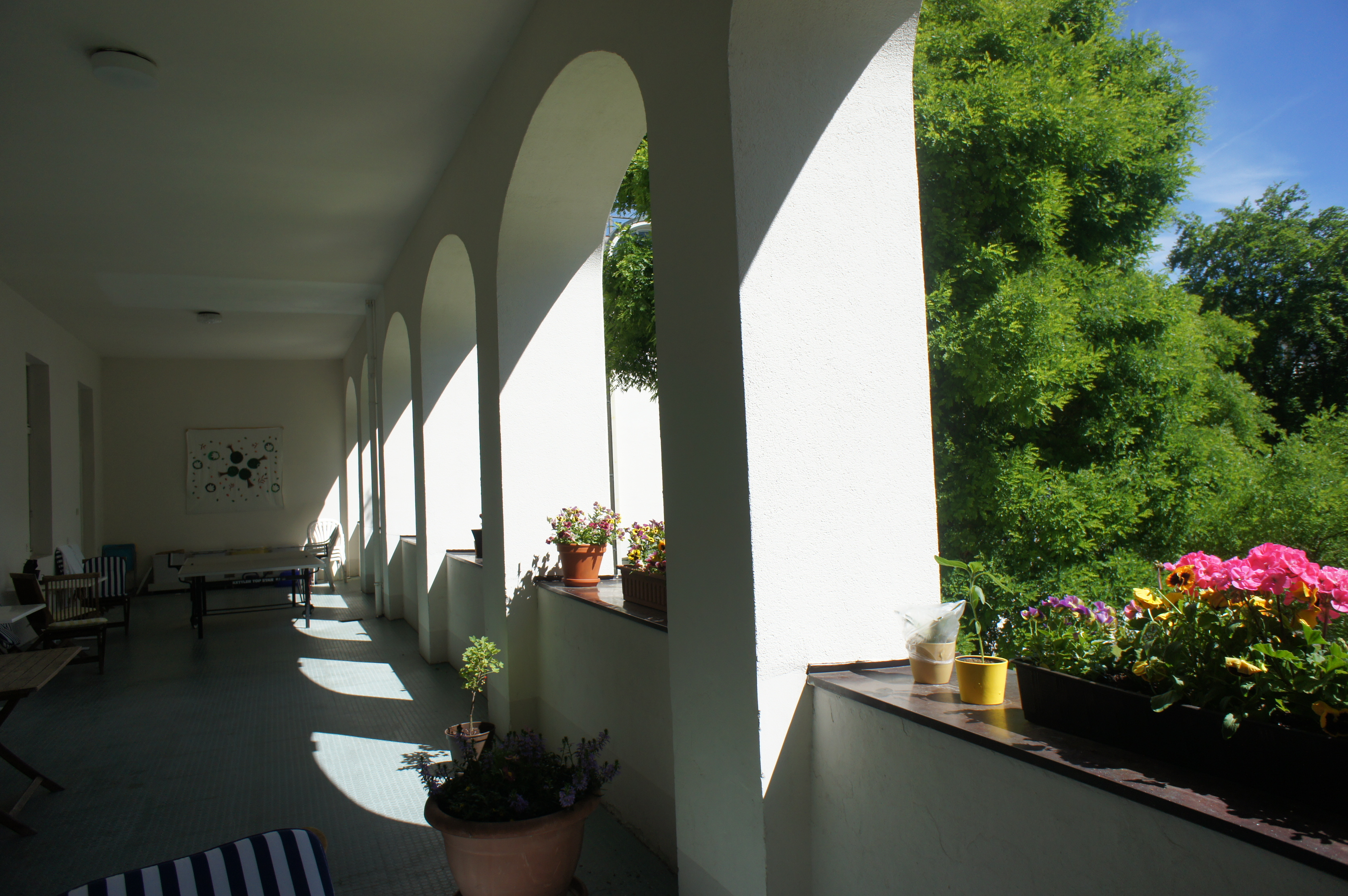 Klinikum Harlaching. Loggia im Altbau. Hier befanden sich früher die Liegeplätze der Lungenkranken.